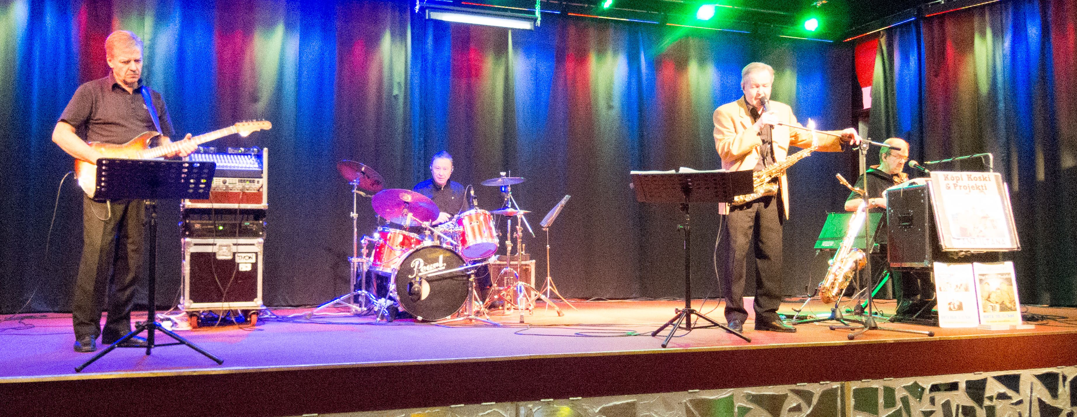 Köpi Koski ja Projekti